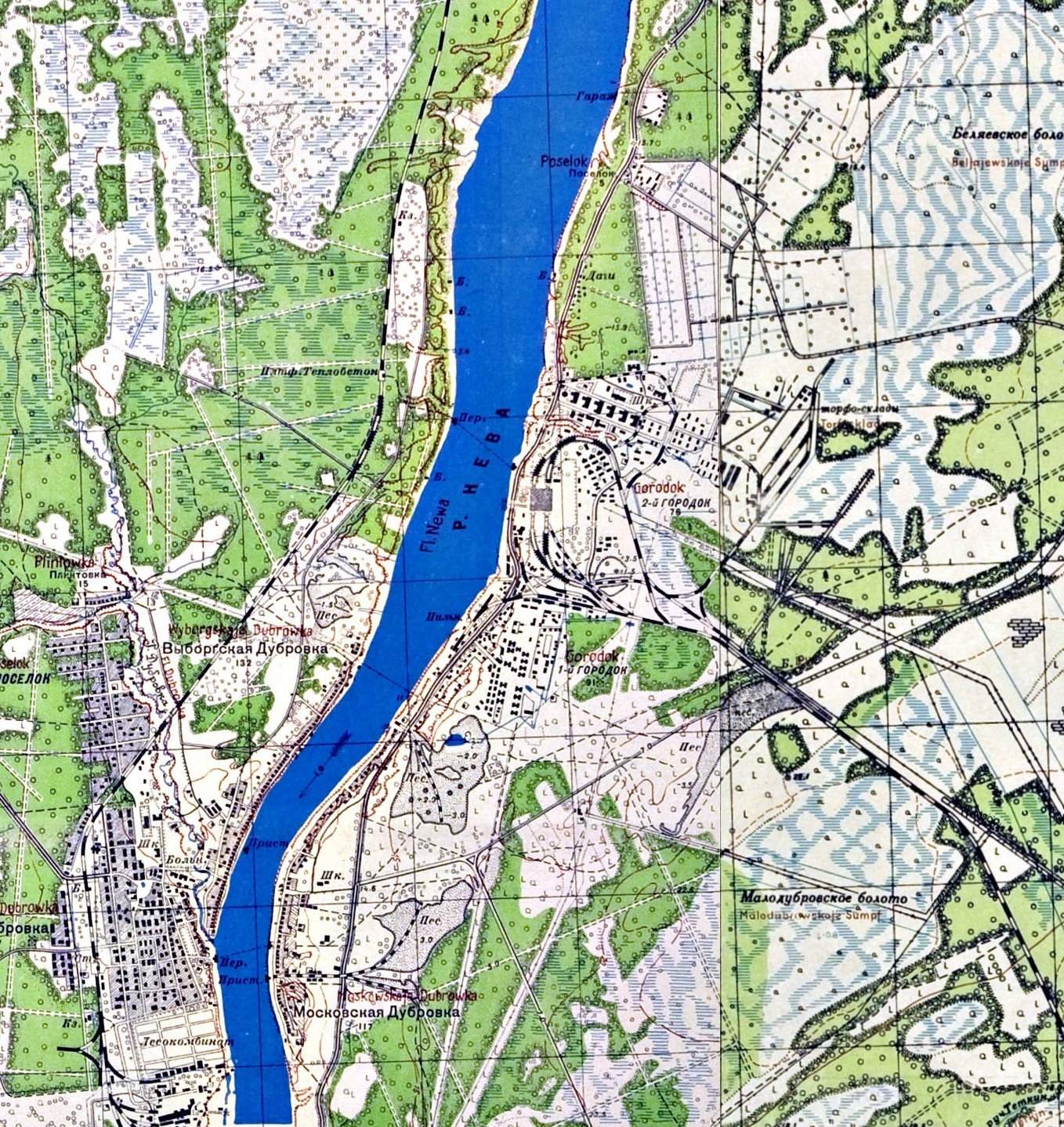 Изображения составлено как склейка двух карт, полученный с сайта paбочий-поселок-5.рф с согласия администрации сайта